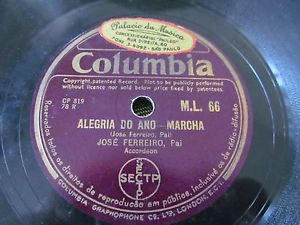 Alegria do Ano, corridinho de José Ferreiro (Pai),pelo próprio